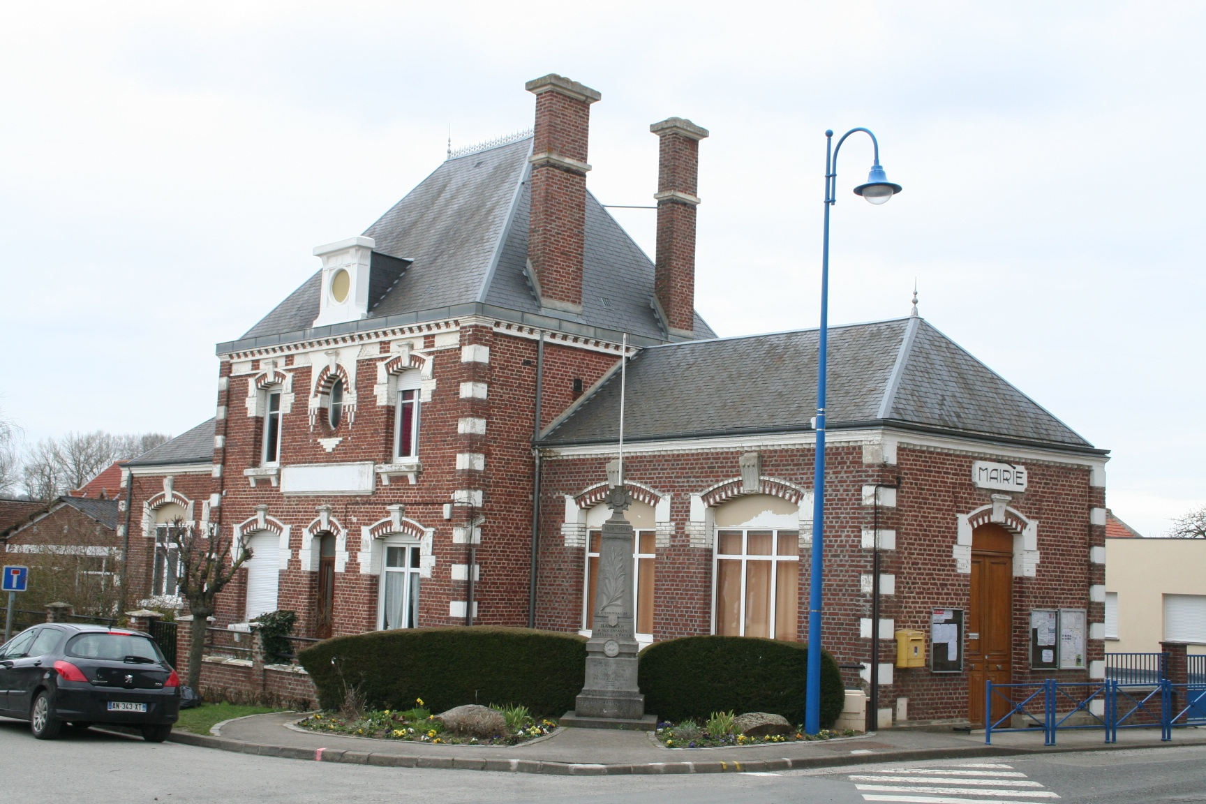 Picard: Mérrie d'Heille, Sonme, Picardie